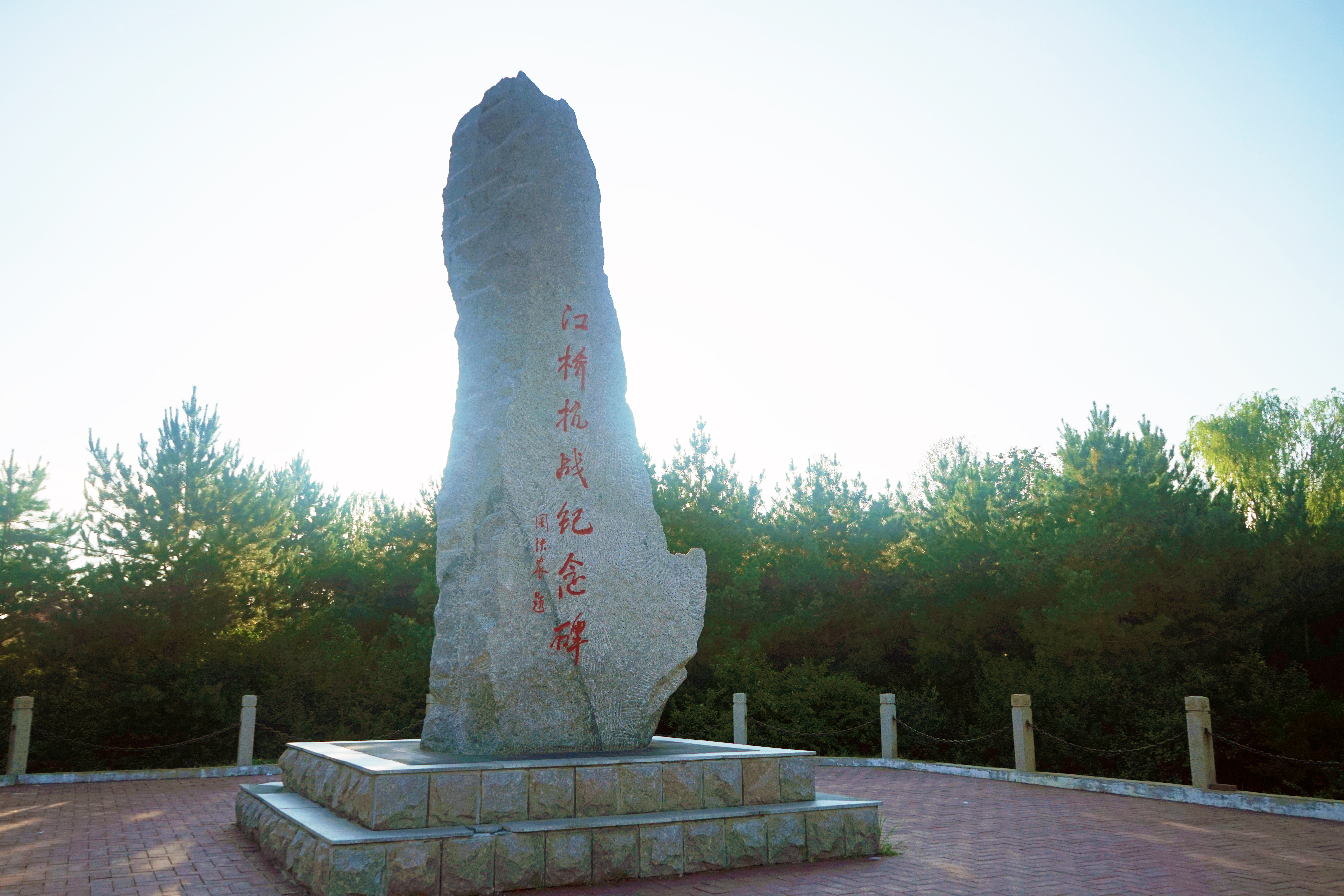 江桥抗战纪念地 江桥抗战纪念碑